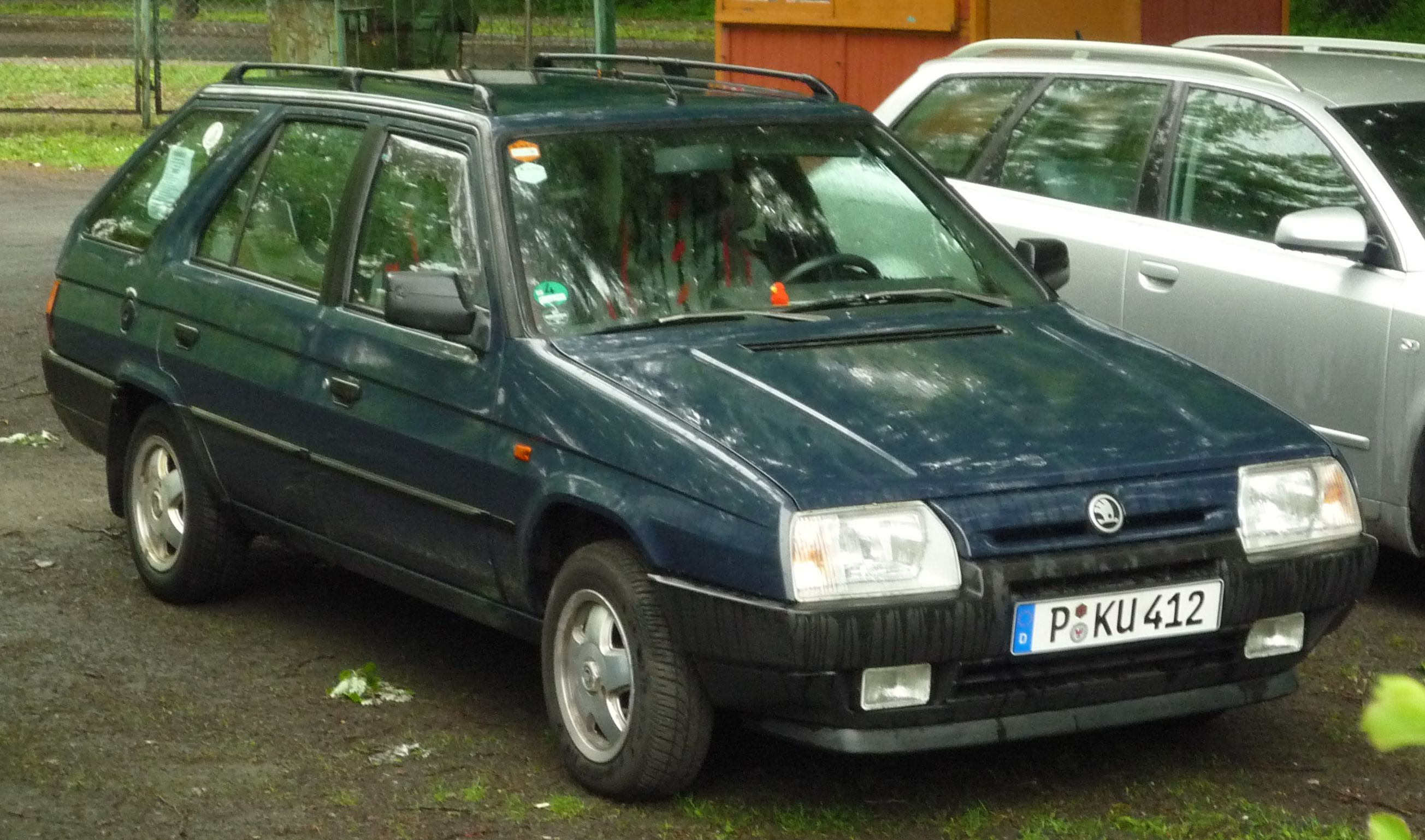 Škoda Forman w Słubicach.